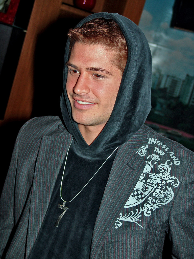 Brazilian actor Dado Dolabella.